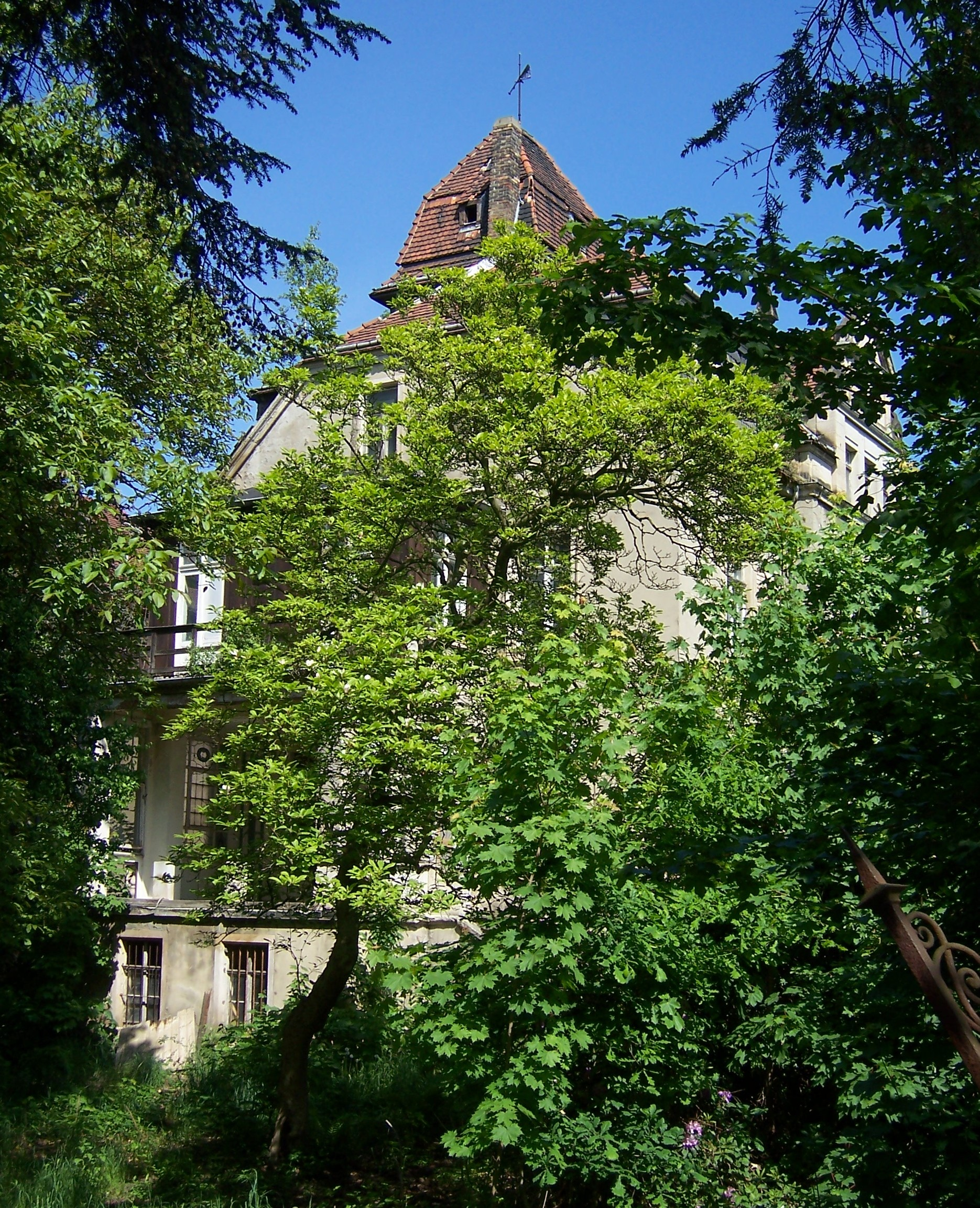 Haus des Baritons Arno Schellenberg in Dresden Oberloschwitz, Bautzner Landstraße 46, heute Ruine.